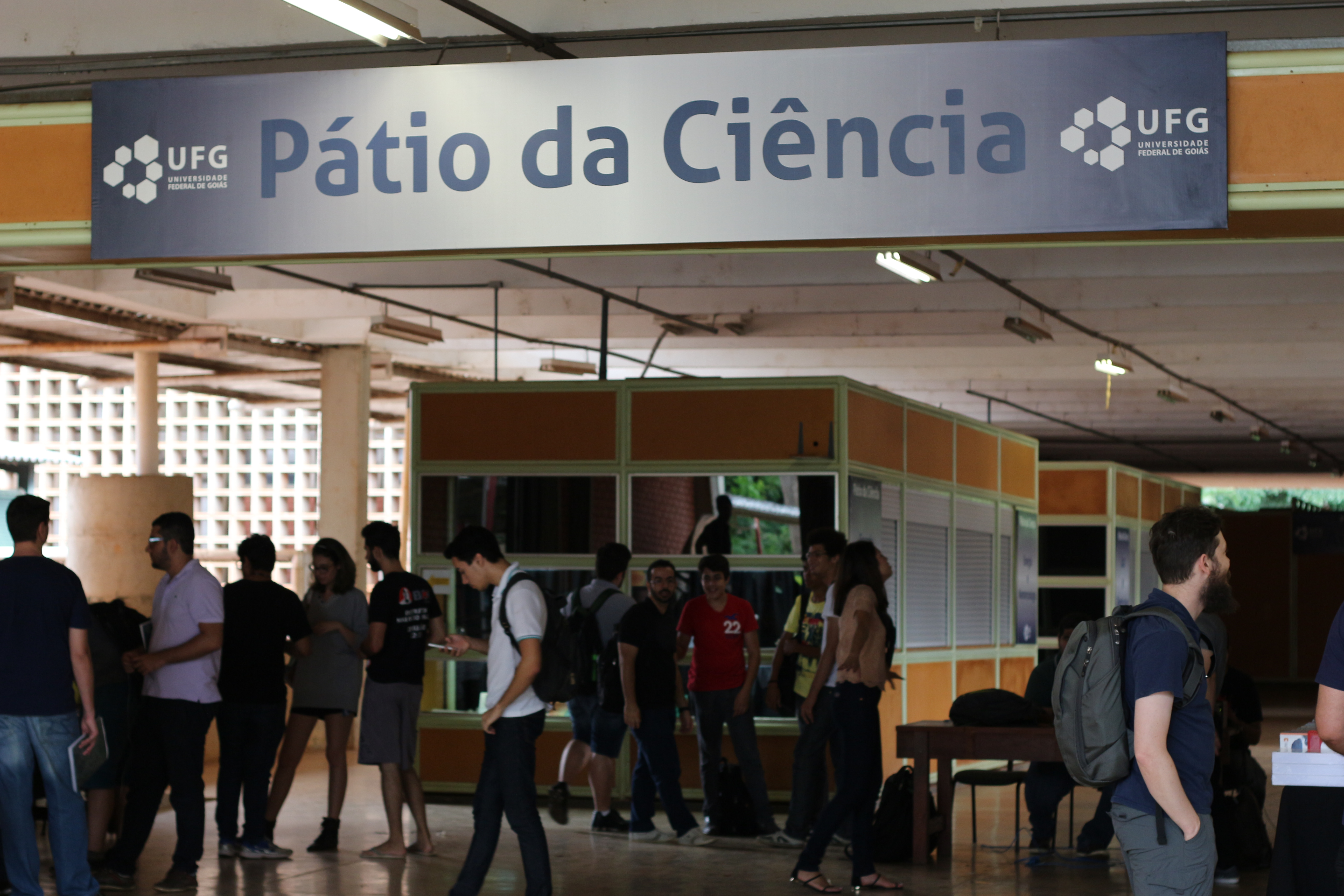 Pátio da Ciência durante a FGSL, UFG. Foto de 18 de novembro de 2016.